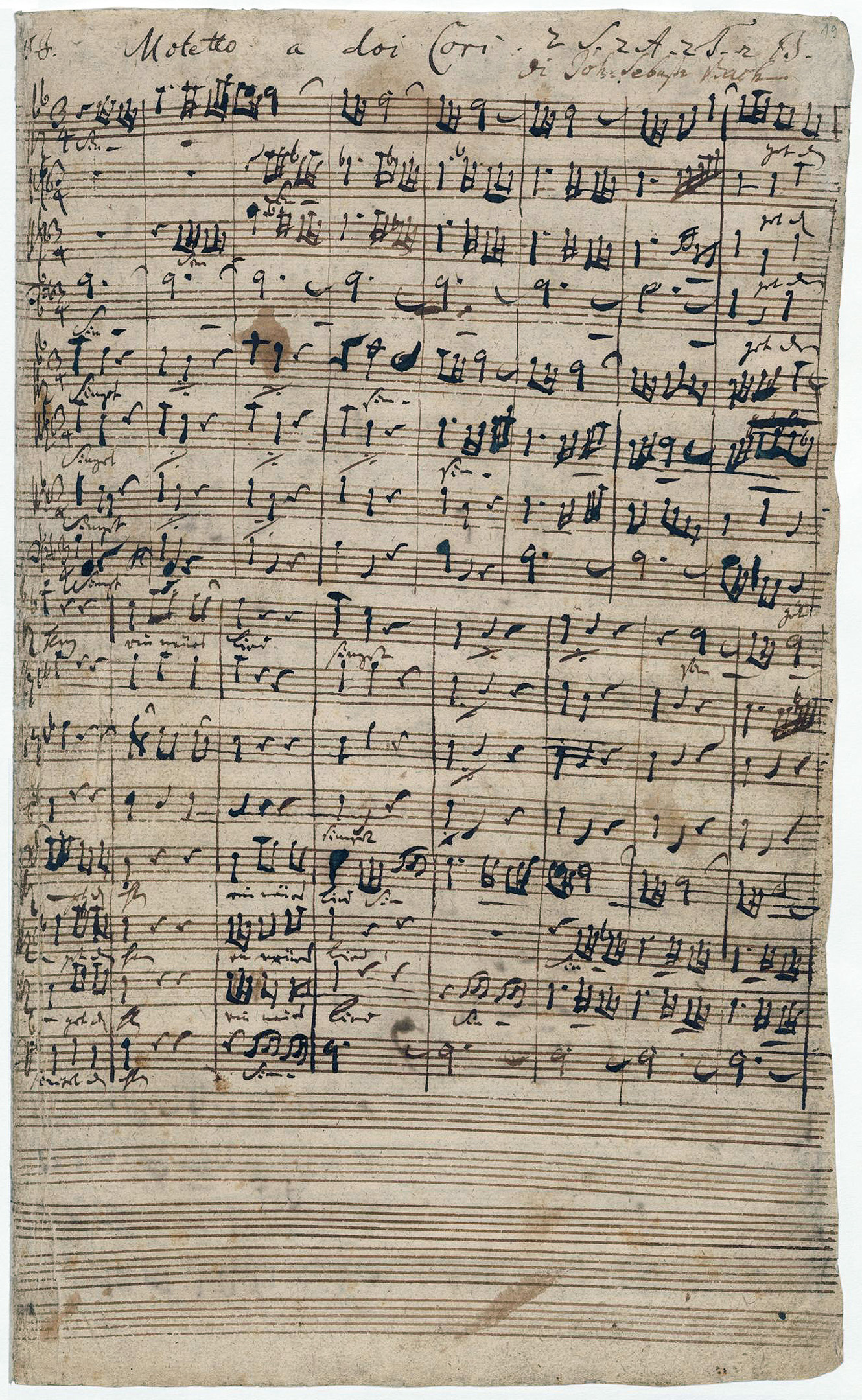 Autograph der Motette Singet dem Herrn ein neues Lied (BWV 225), komponiert von Johann Sebastian Bach (1685–1750) zwischen Juni 1726 und April 1727